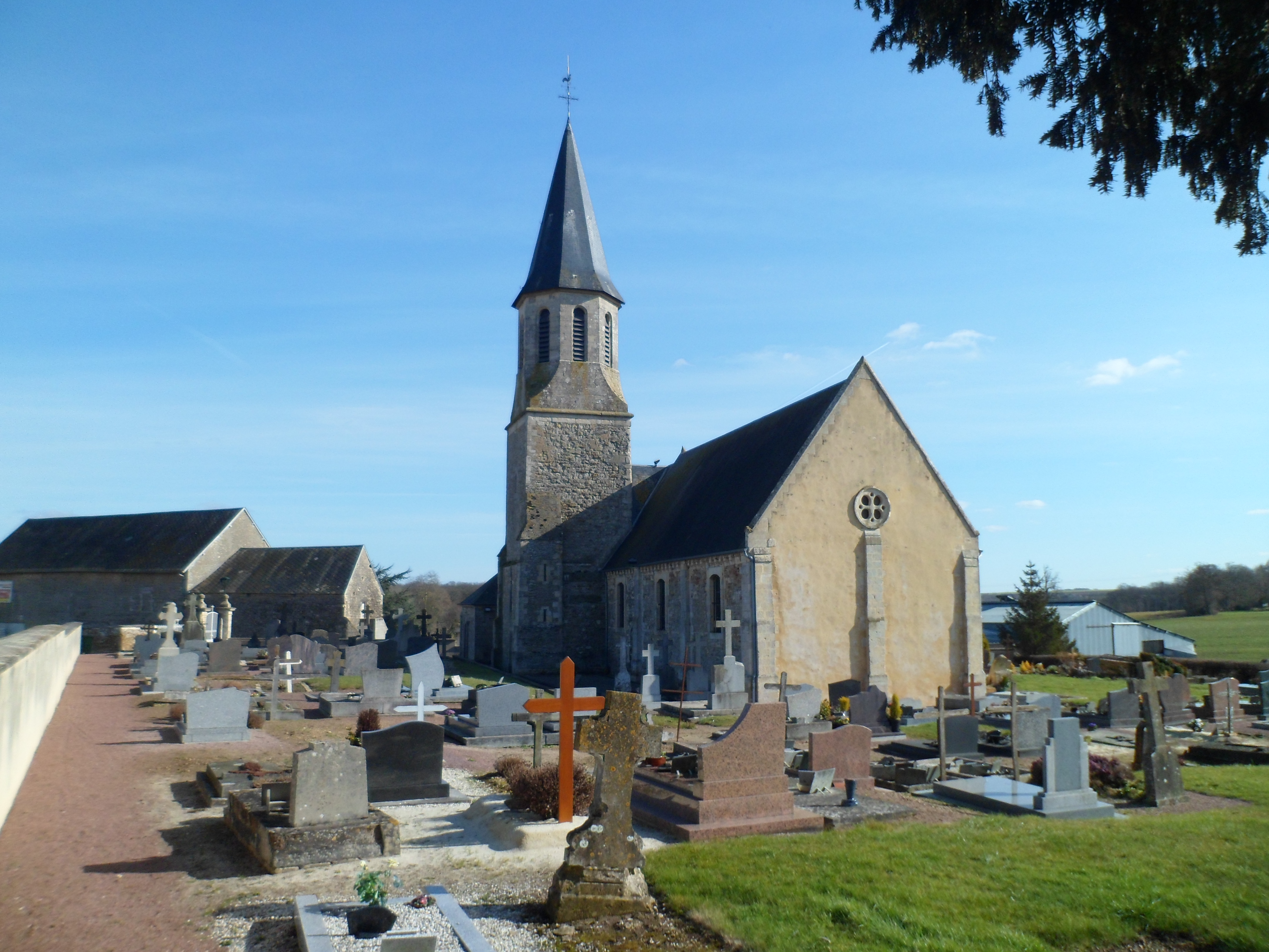 Église Saint-Jean-Baptiste de Missy